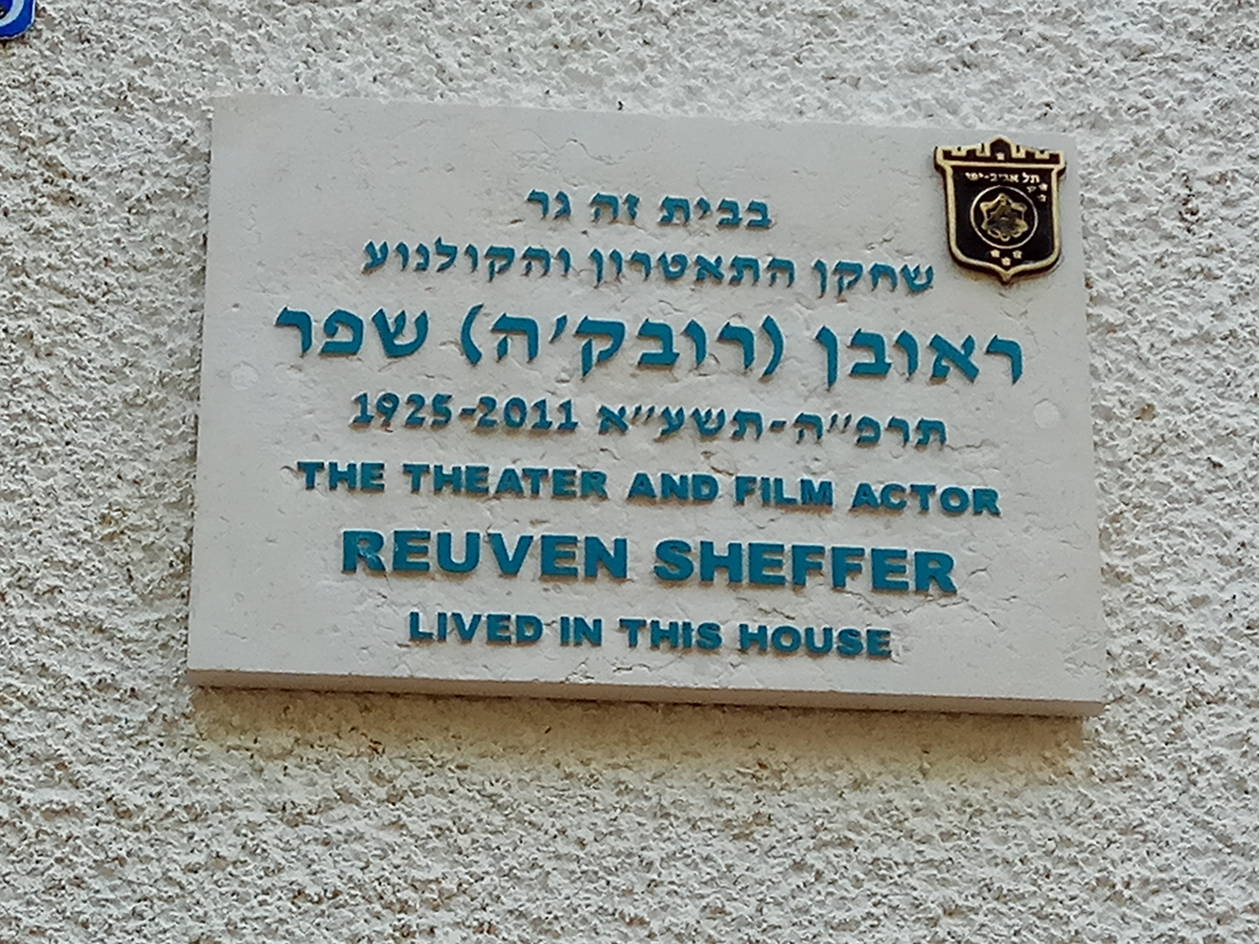 לוחית זיכרון בכניסה לביתו של ראובן שפר ברחוב שלמה המלך 22 בתל אביב